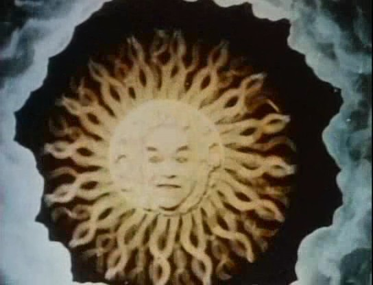 Méliès, Le voyage a travers l'impossible1904 colorizée 19